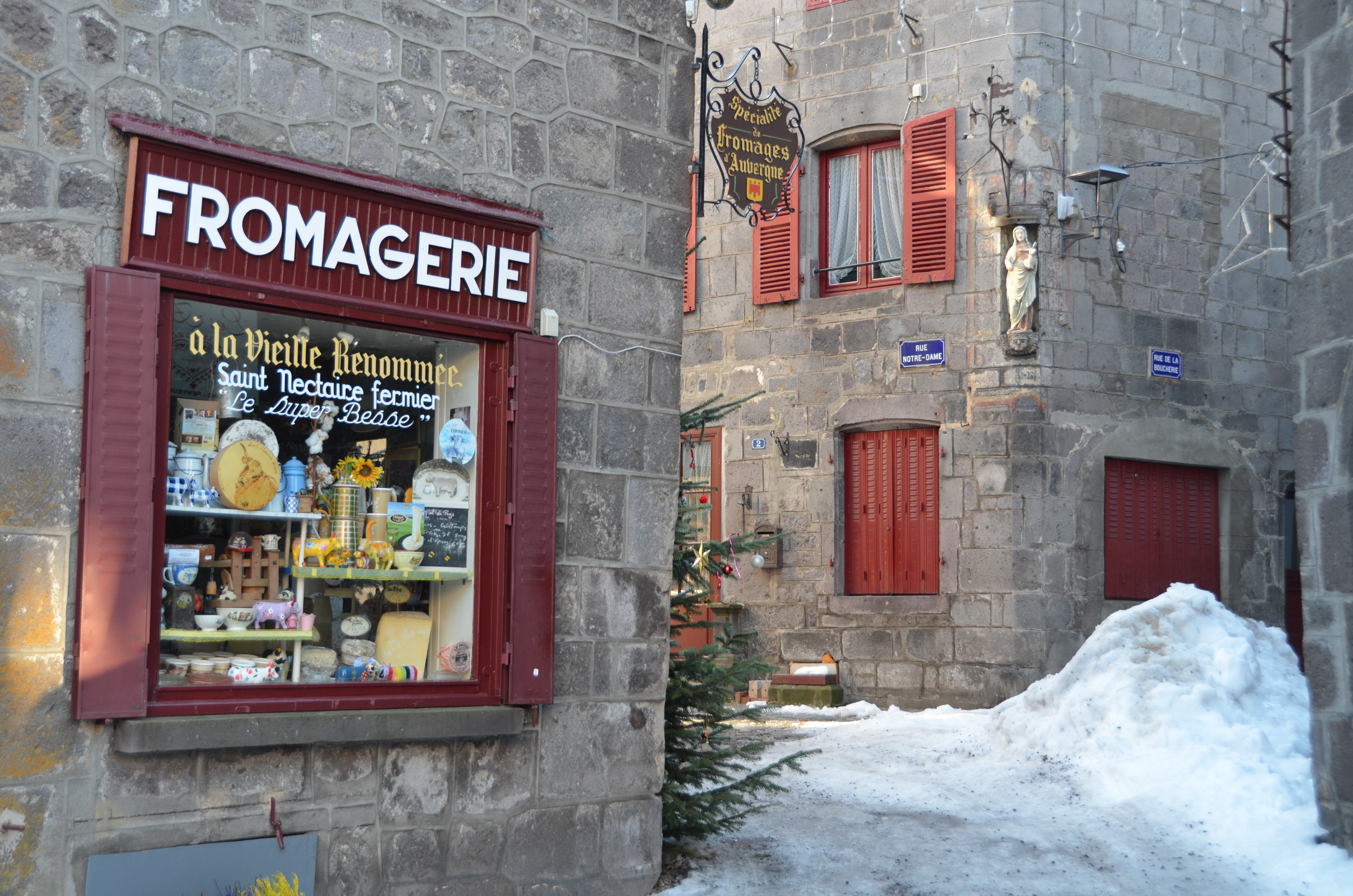 Formatgeria a Beça (occità), Besse (francès)